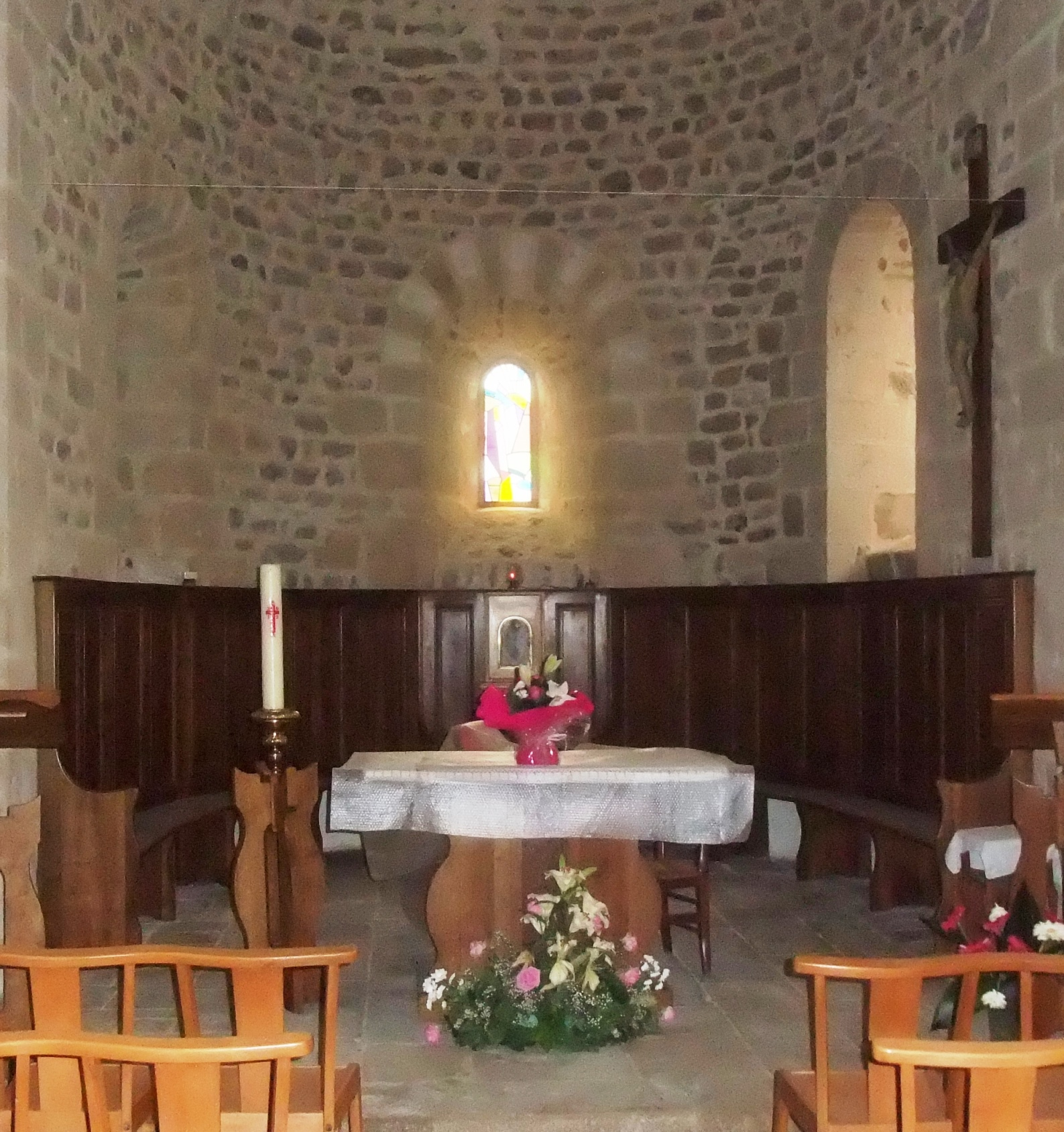 Saint-Clair (Ardèche) église choeur 1